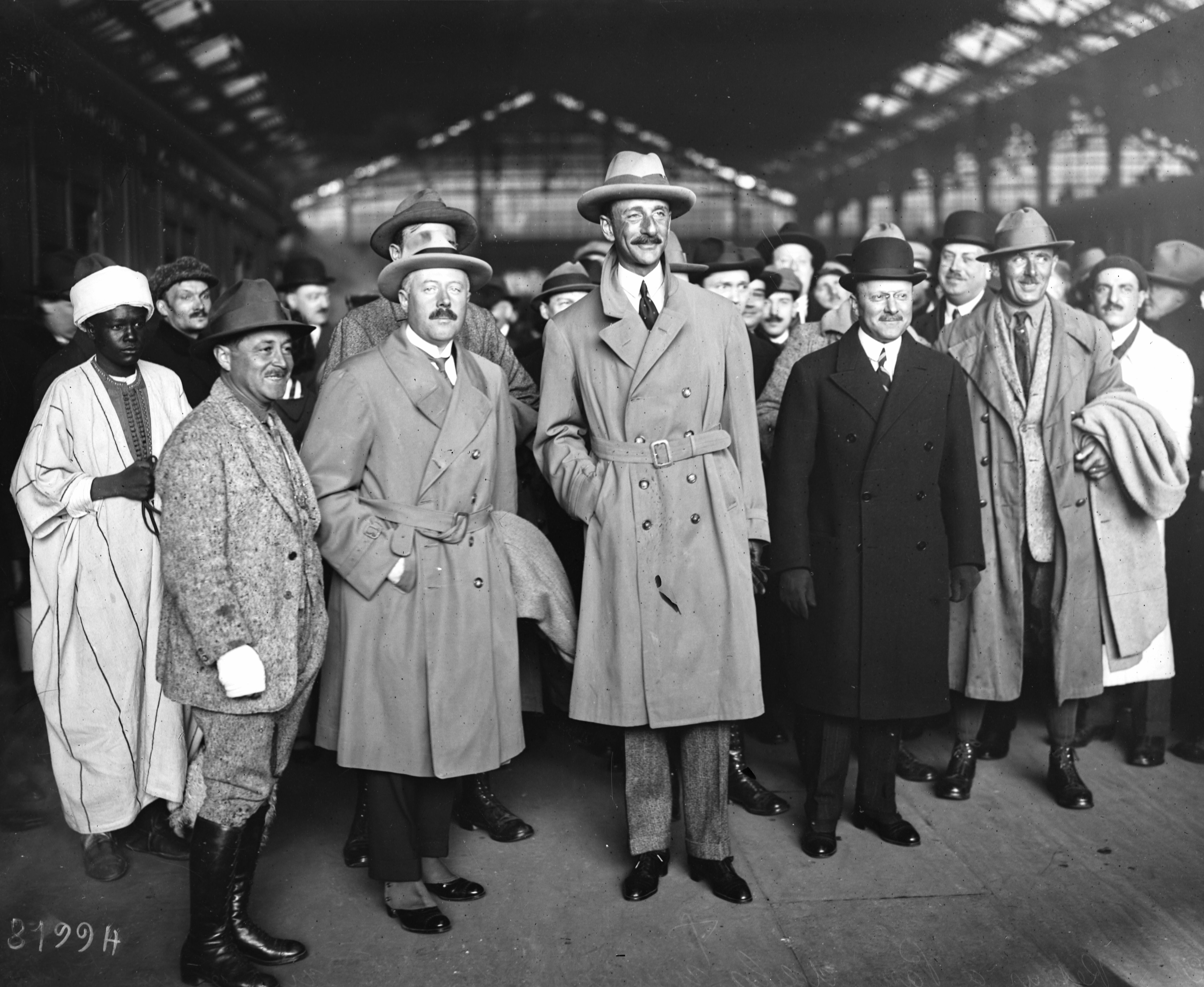 En imperméable fermé, au centre, de gauche à droite : Louis Audouin-Dubreuil et Georges-Marie Haardt. En veste et chapeau noir : André Citroën. Photographie prise en mars 1923 à la gare de Lyon au retour de la première traversée du Sahara en automobile. Détail d'un négatif sur plaque de verre, 13 X 18 cm.